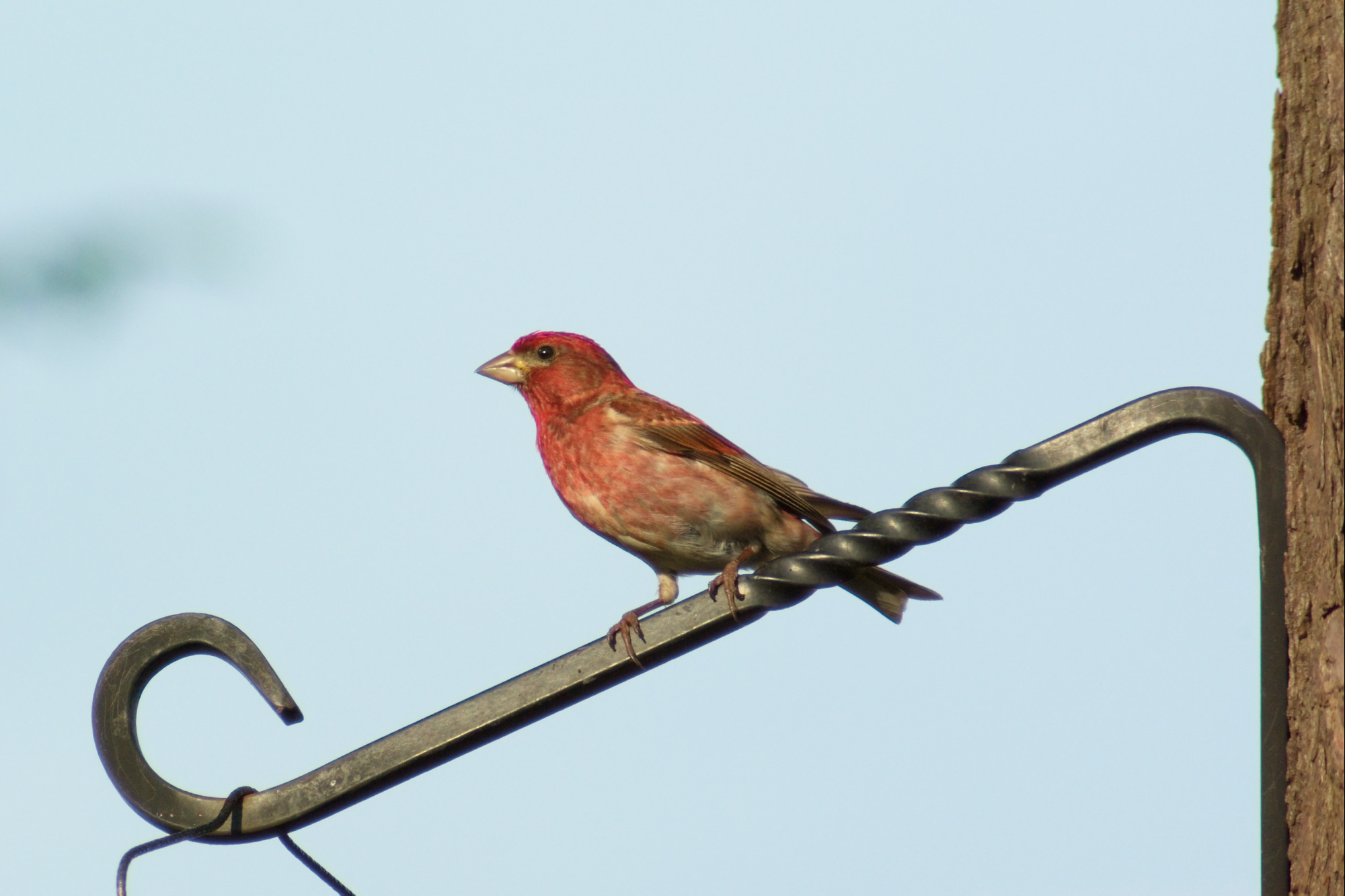 Male Purple Finch (Carpodacus purpureus)